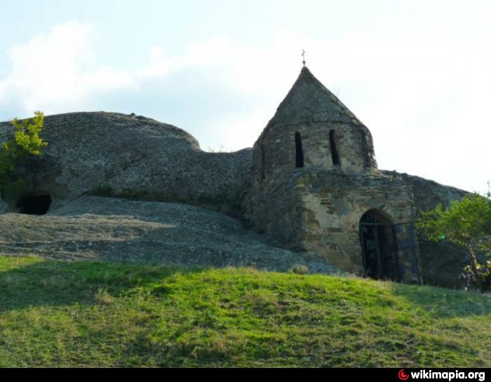 კვირაცხოვლის სახელობის ეკლესია სოფელ ქვახვრელში